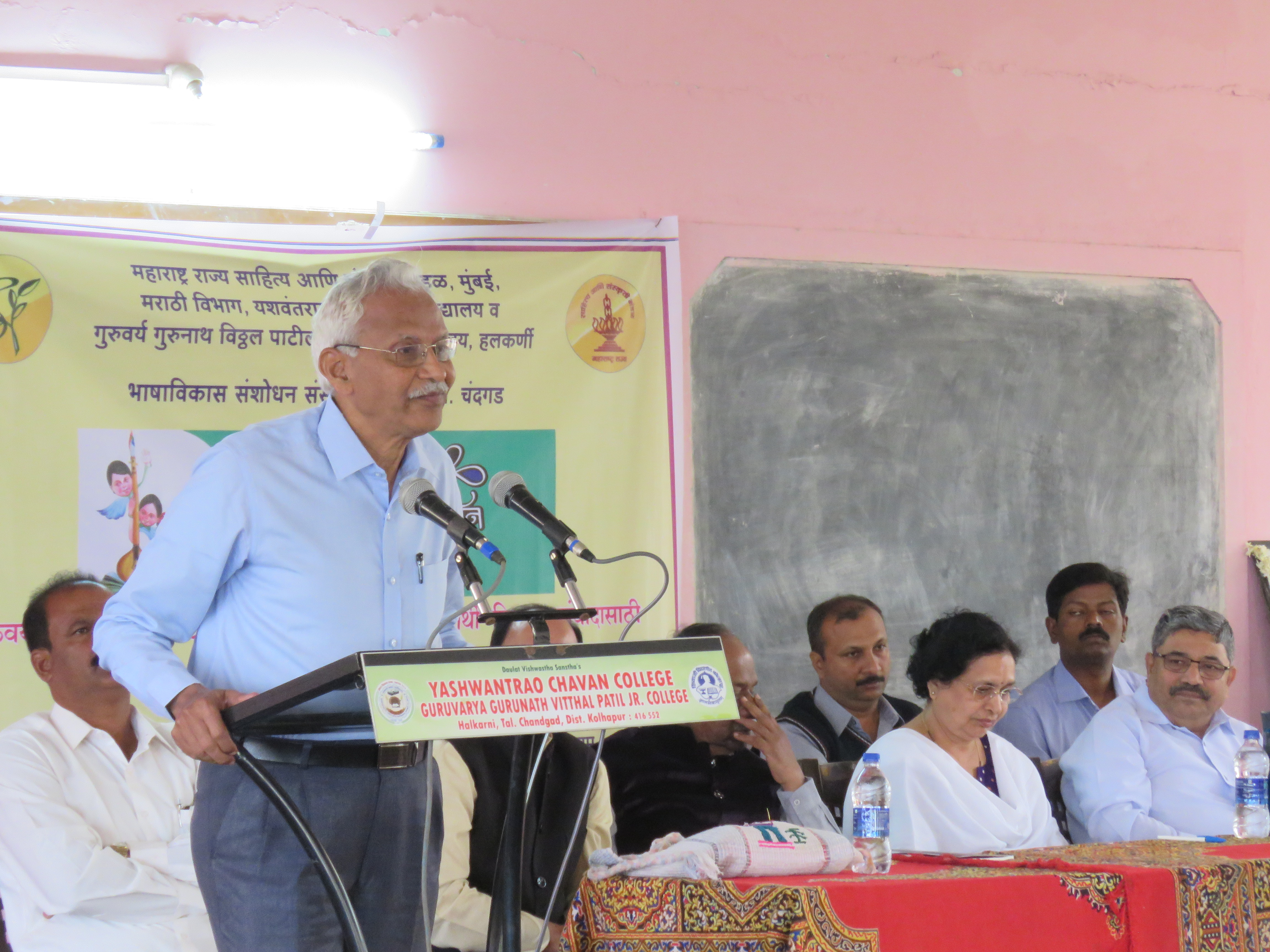 सुनीलकुमार लवटे